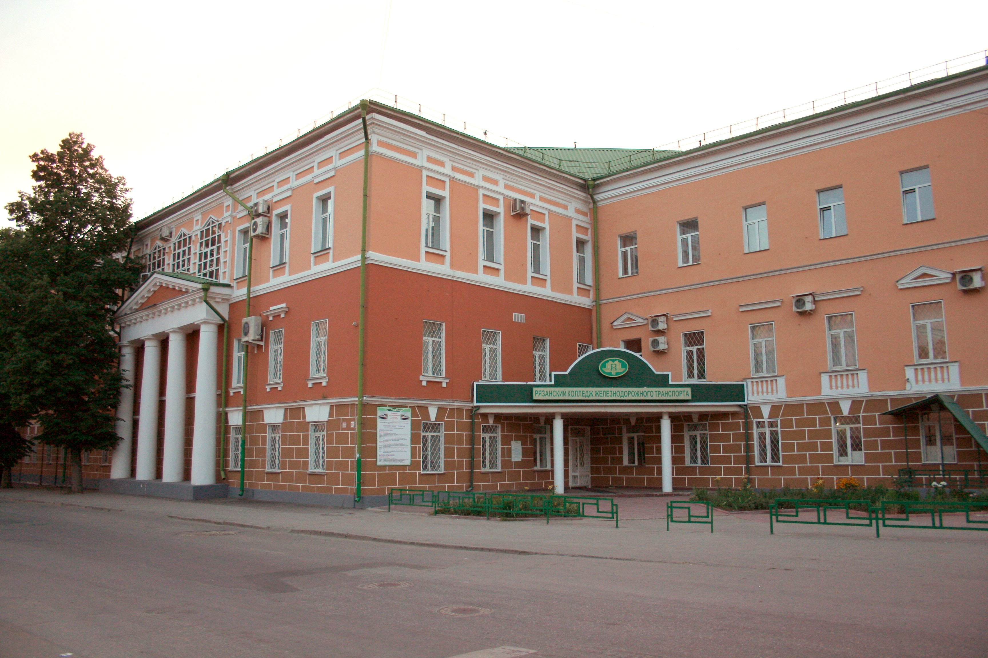 Stadt Rjasan (Russland). Eisenbahnerkolleg.